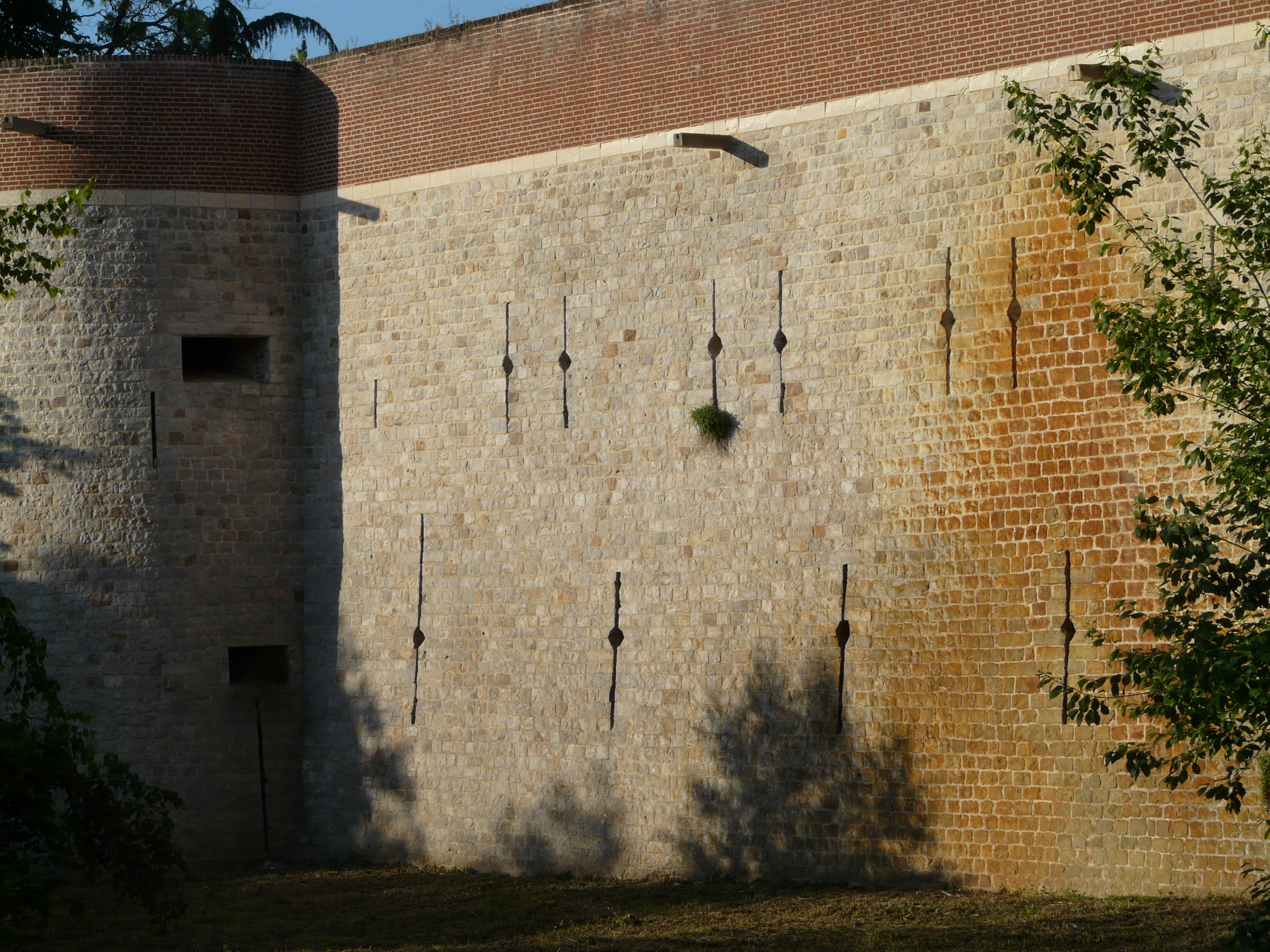 Château de Selles à Cambrai: muraille côté sud et meurtrières